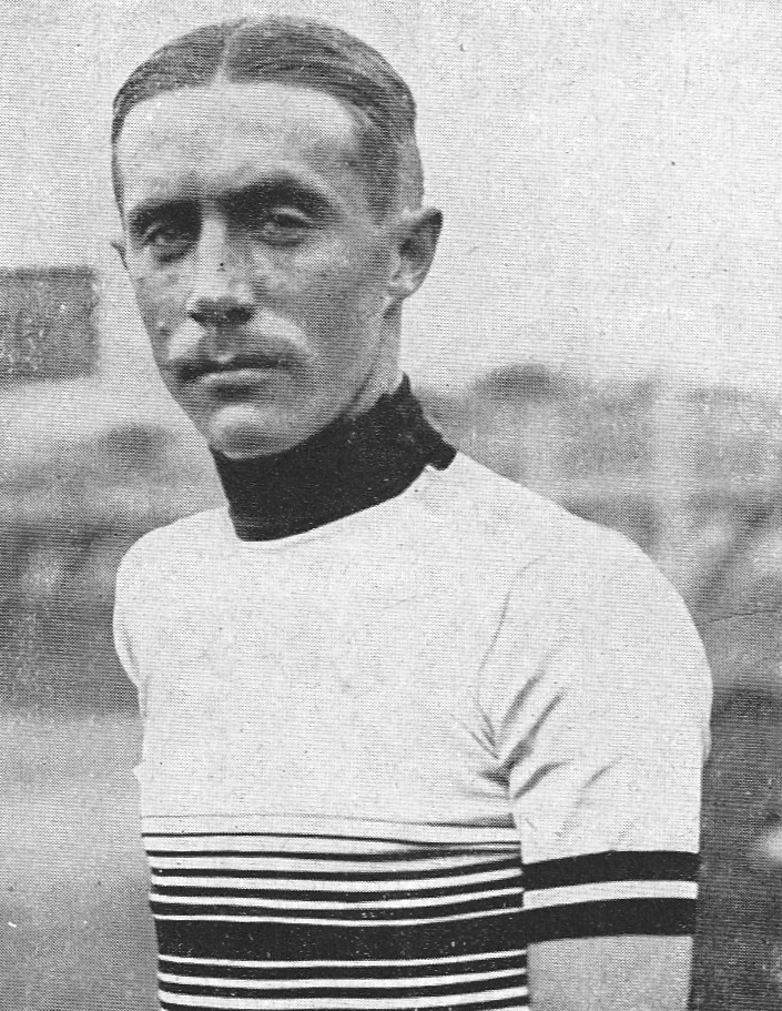 Oscar Egg, Schweizer Radsportler